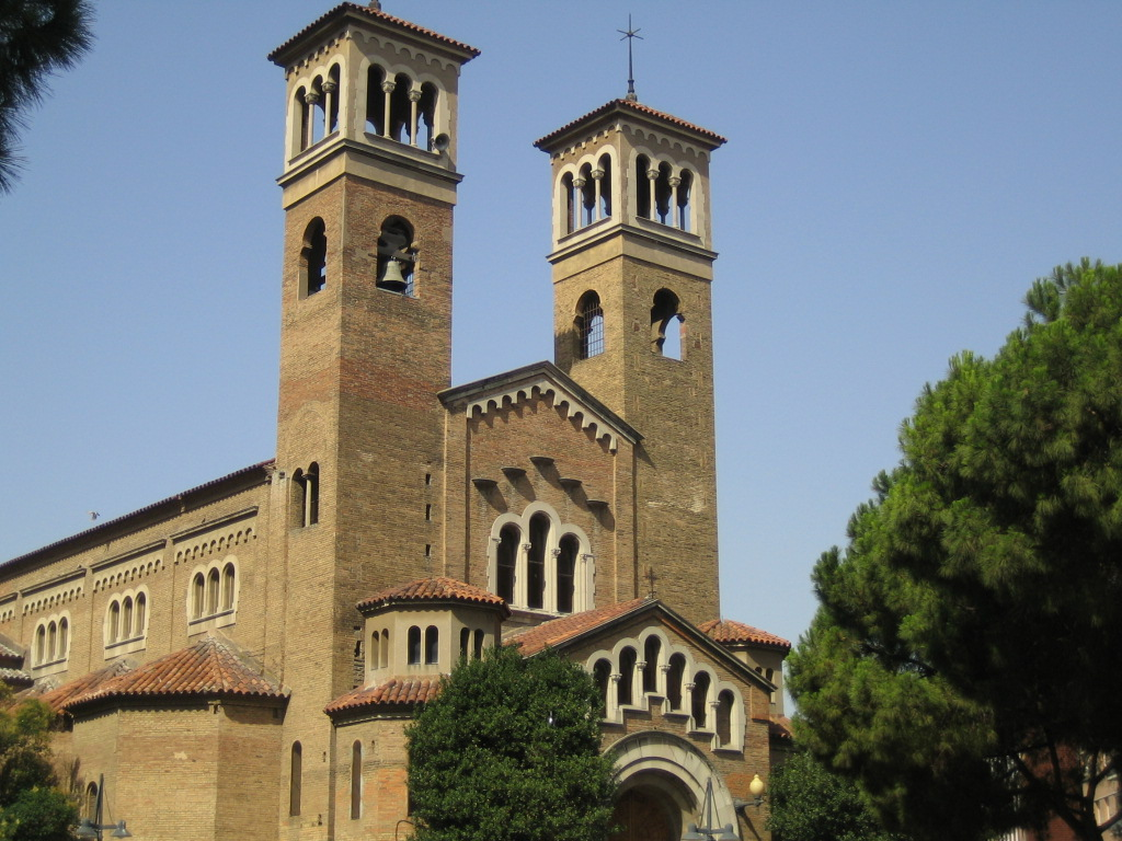 Foto hecha por mi desde la calle santa eulalia hacia el sur en horitonzal, el viernes 15 de Julio del 2005 a las 09:52 de la mañana. Con la cámara CANON ixus 40